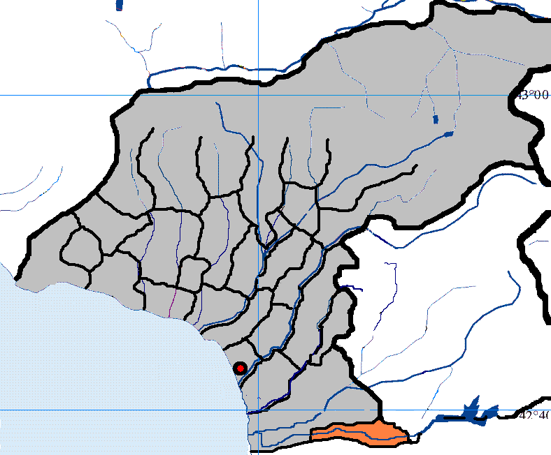 село Шашалат в Очамчирском районе